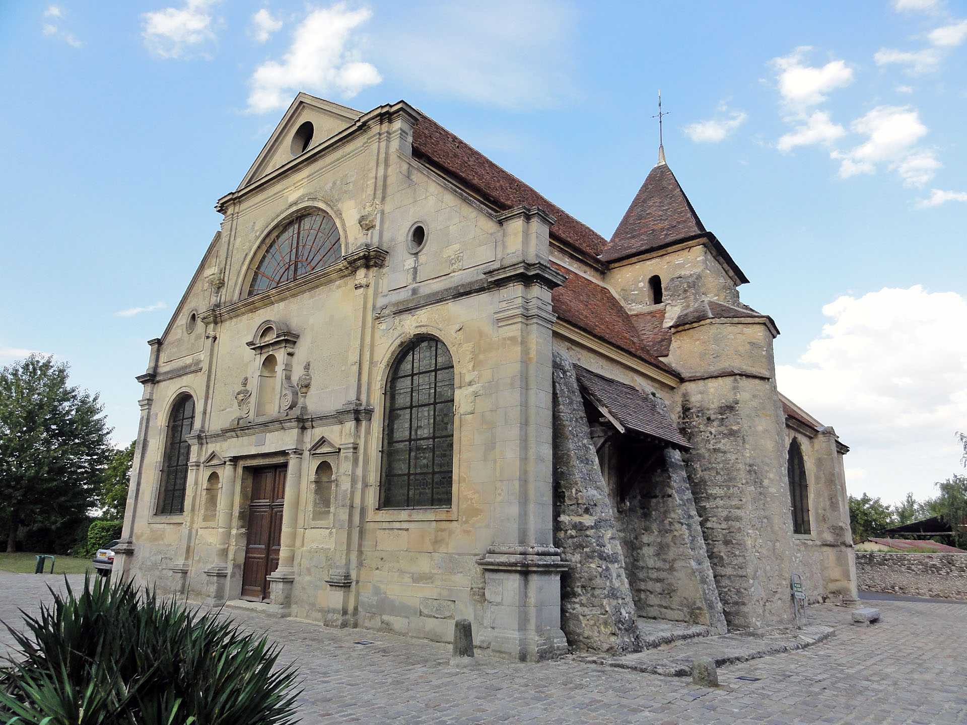 L'église Notre-Dame-de-l'Assomption au Plessis-Gassot, Val-d'Oise, France.